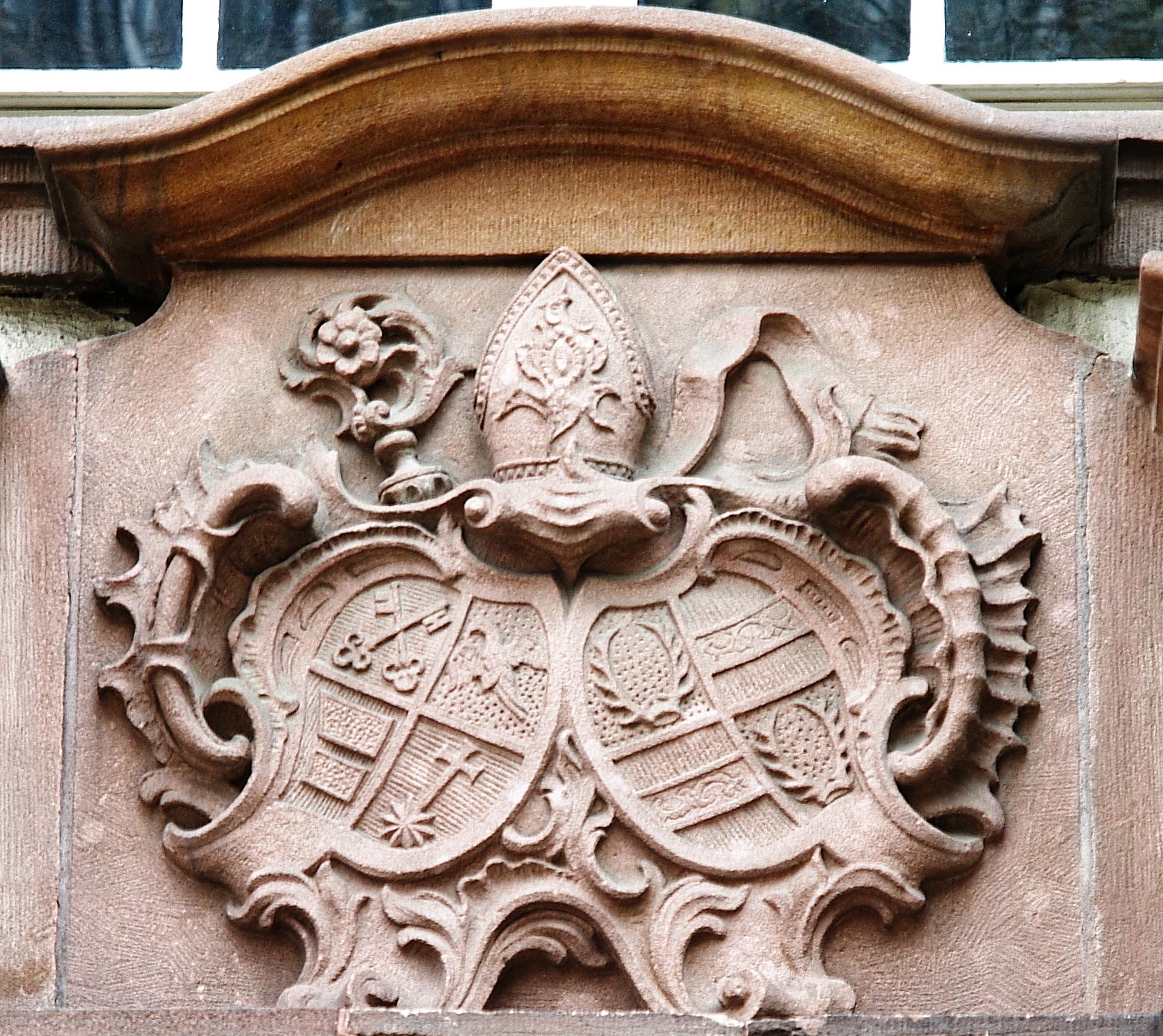 Eingang zum Peterhof und Peterhofkapelle. Der Türsturz mit dem Klosterwappen und dem Wappen des Abtes Philipp Jakob Steyrers (Feld 1 und 4: Von Rot, Silber und Schwarz zweimal geteilt, Feld 2 und 3: in Gold ein schwarzes Hirschgeweih)